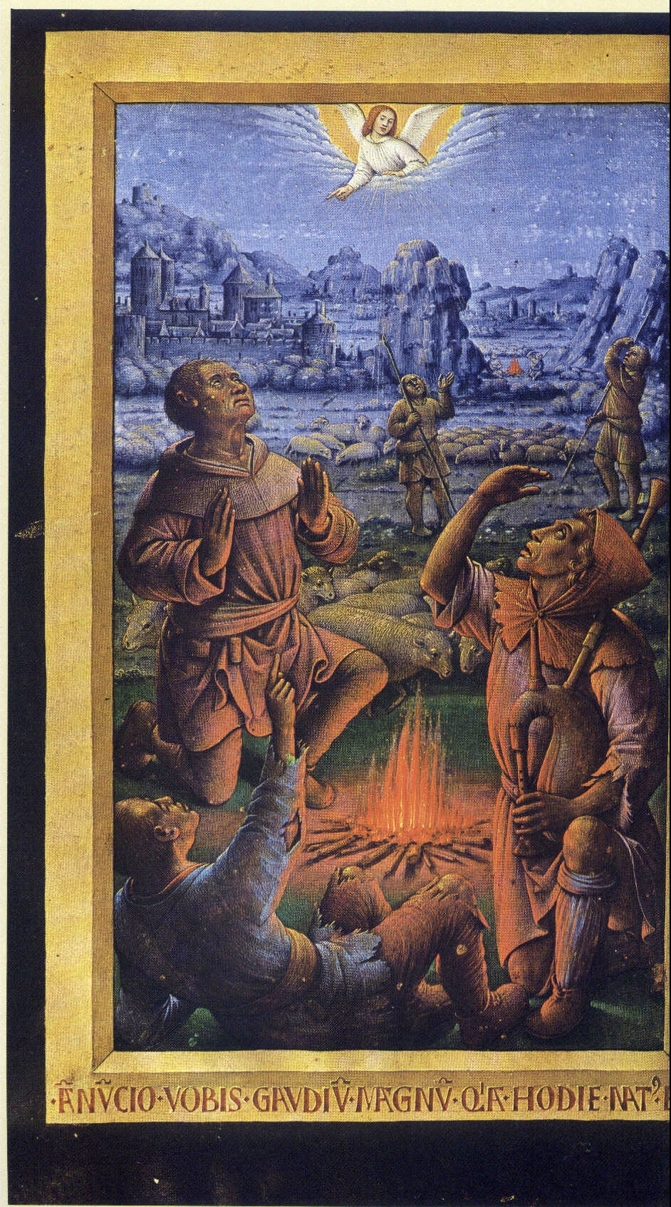 Miniatur Des Engels Verkündigung an die Hirten